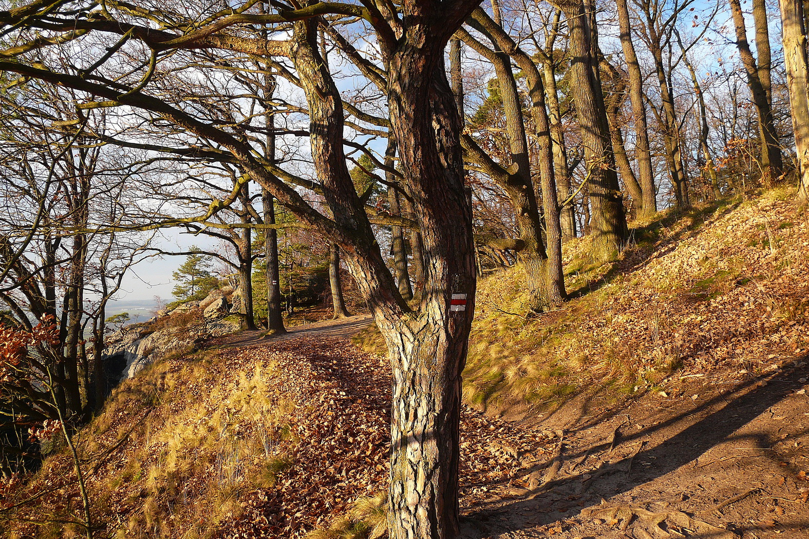 Stezka po okraji skalní plošiny Hrada